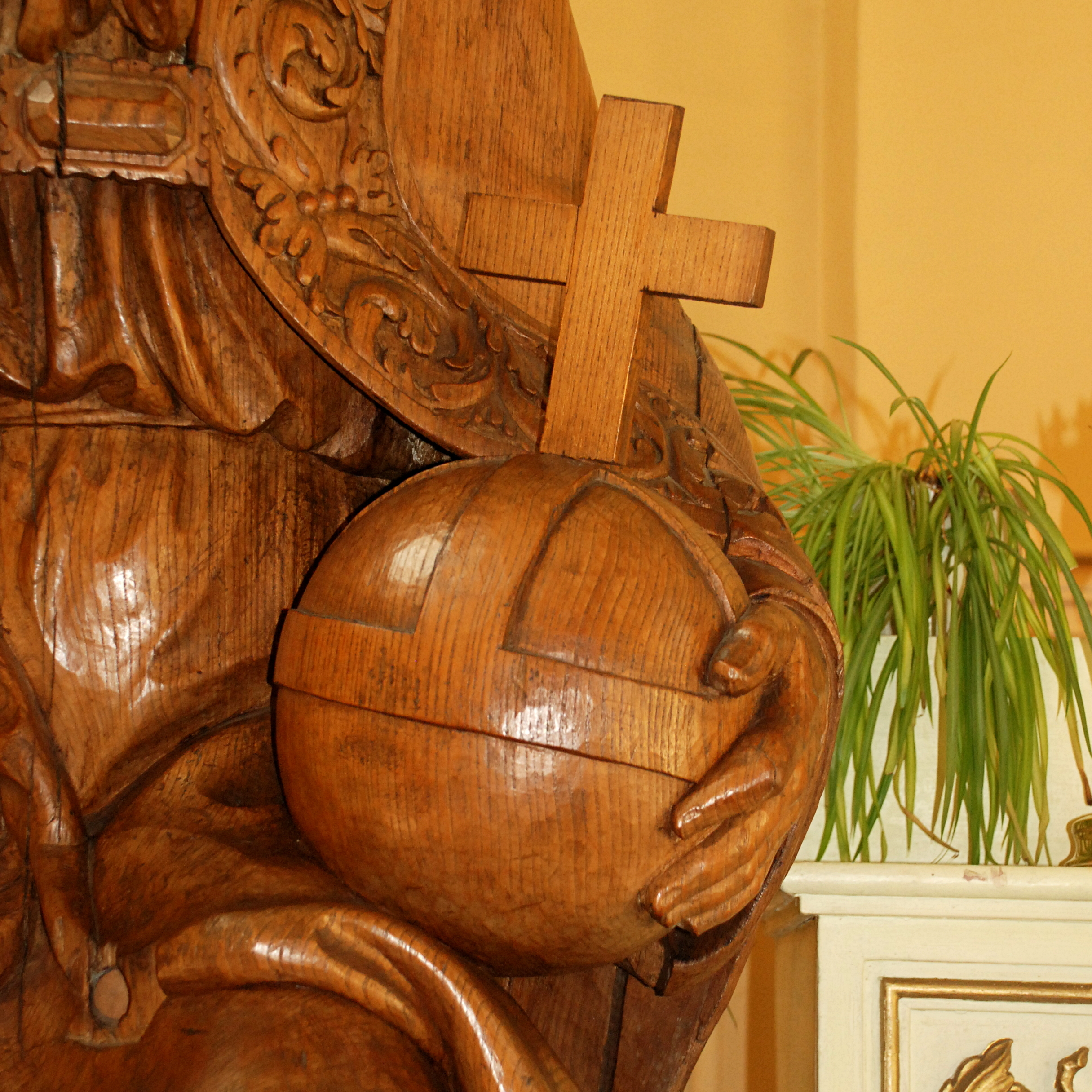 Belgique - Brabant wallon - Mont-Saint-Guibert - Église Saint-Guibert - statuaire baroque provenant de l'ancienne église des Augustins de Bruxelles (désacralisée en 1842)